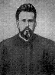 Akimov, Vladimir Petrovic (Machnovec) Акимов Владимир Петрович (Махновец) (1872-1921)